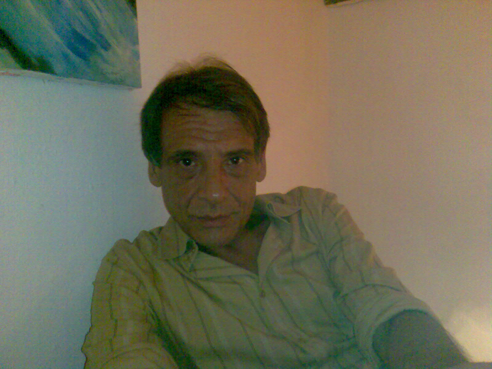 ürk tiyatro, sinema ve dizi oyuncusu, oyun yazarı, tiyatro yönetmeni Civan Canova